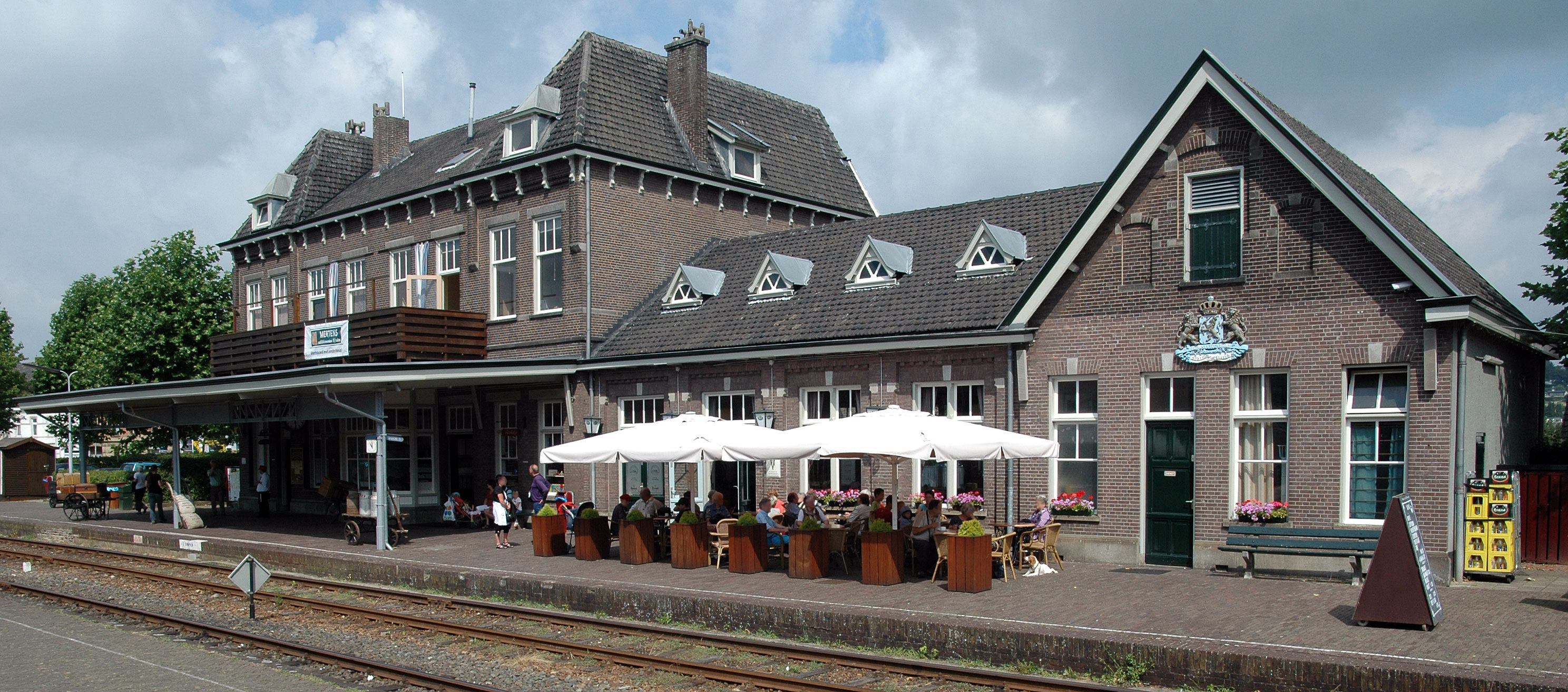 Station Simpelveld, NL